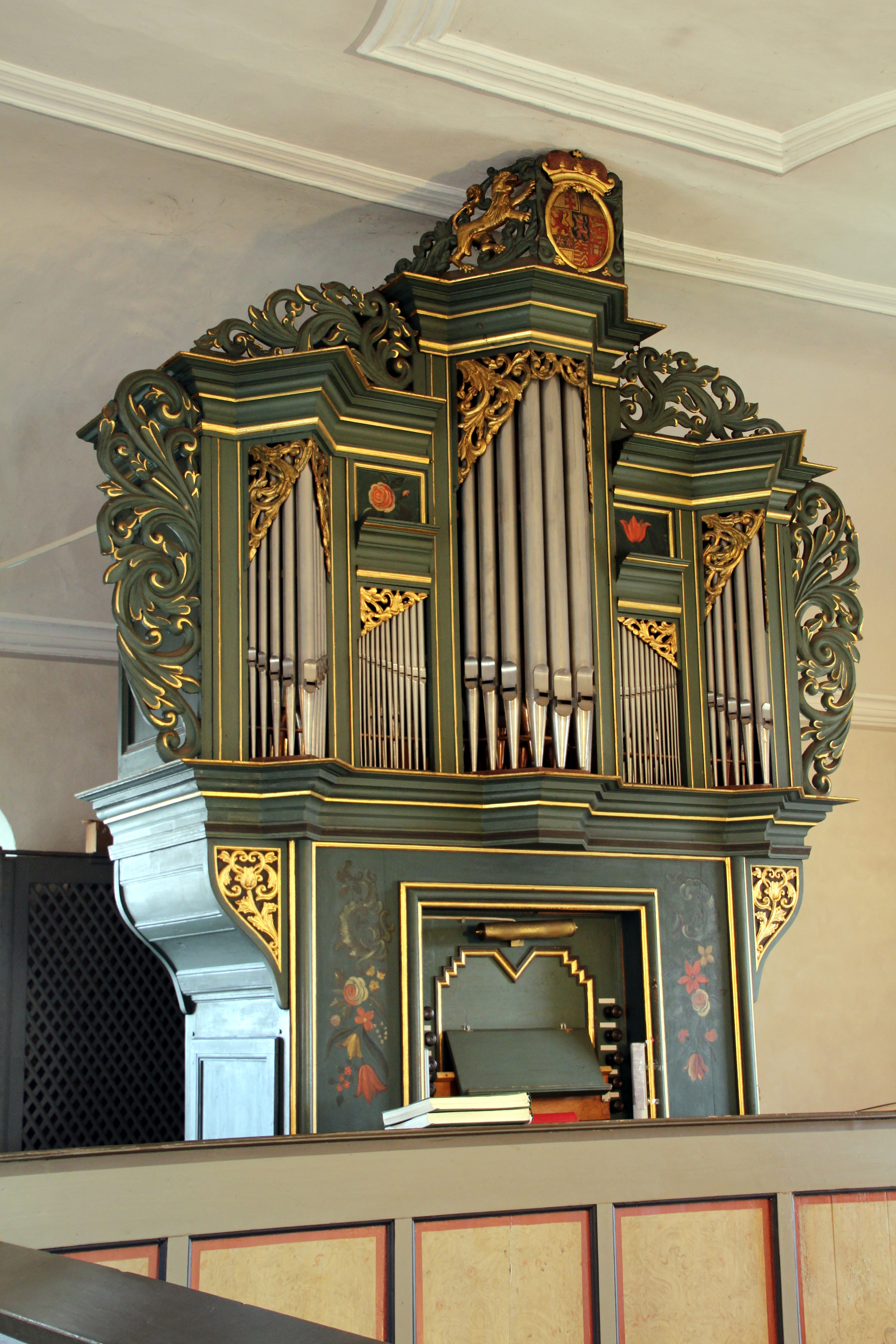 Ev. Kirche Erbstadt